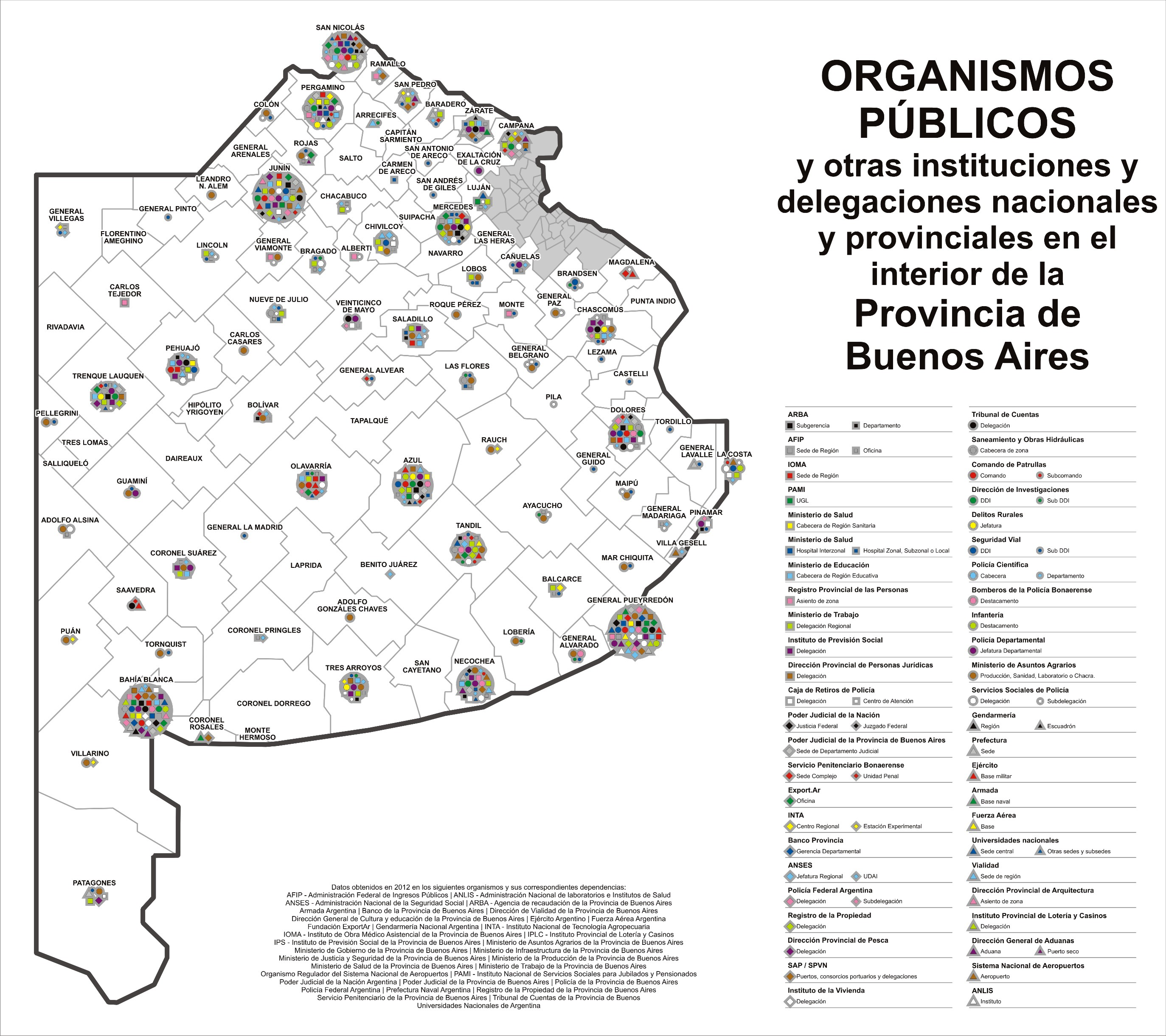 Organismos públicos y otras instituciones nacionales y provinciales en el interior de la provincia de Buenos Aires. Fuentes: cada uno de los organismos mencionados en el mapa.